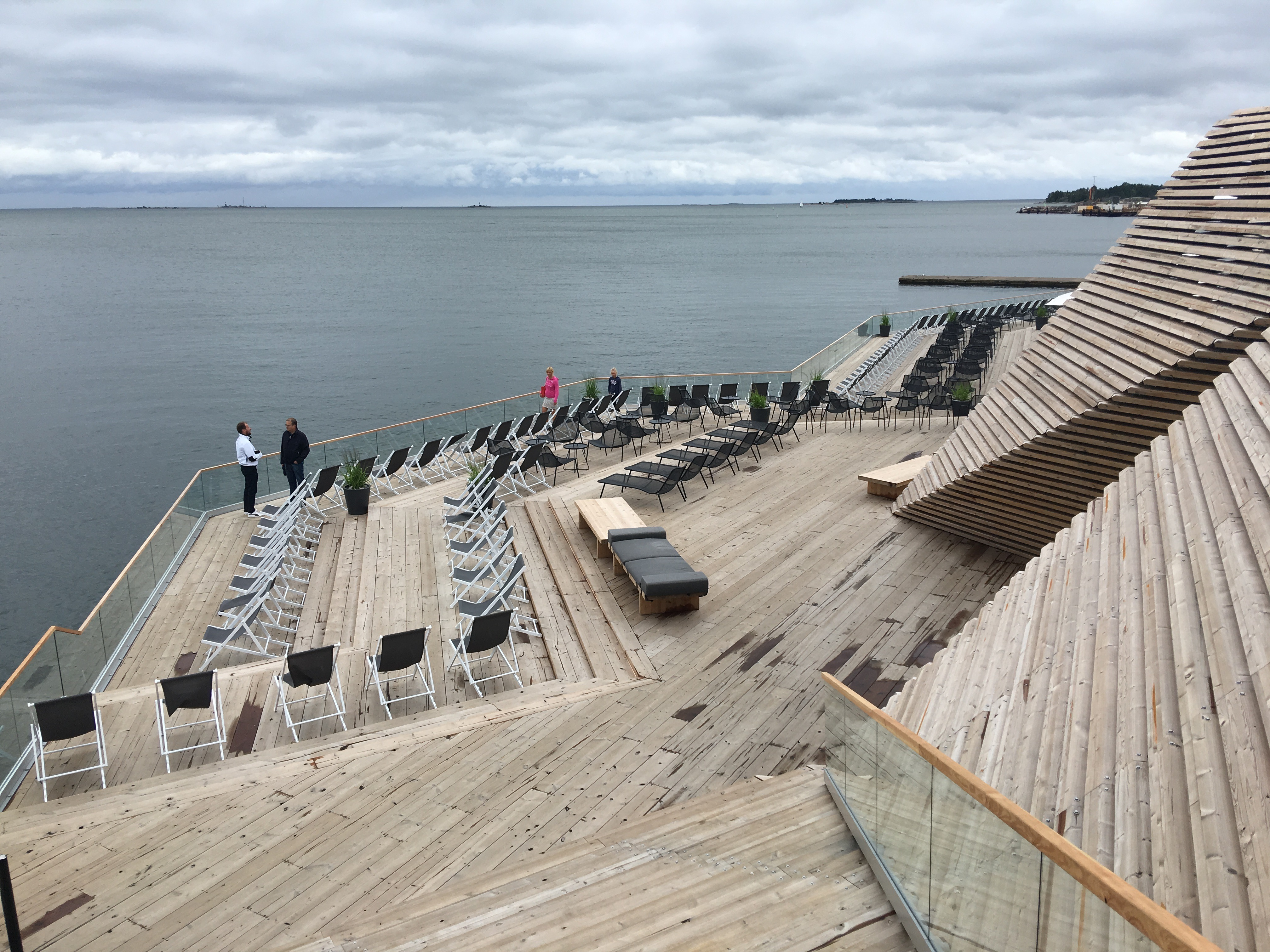 Helsingin Hernesaaressa sijaitsevan Löyly -saunakompleksin terassi.